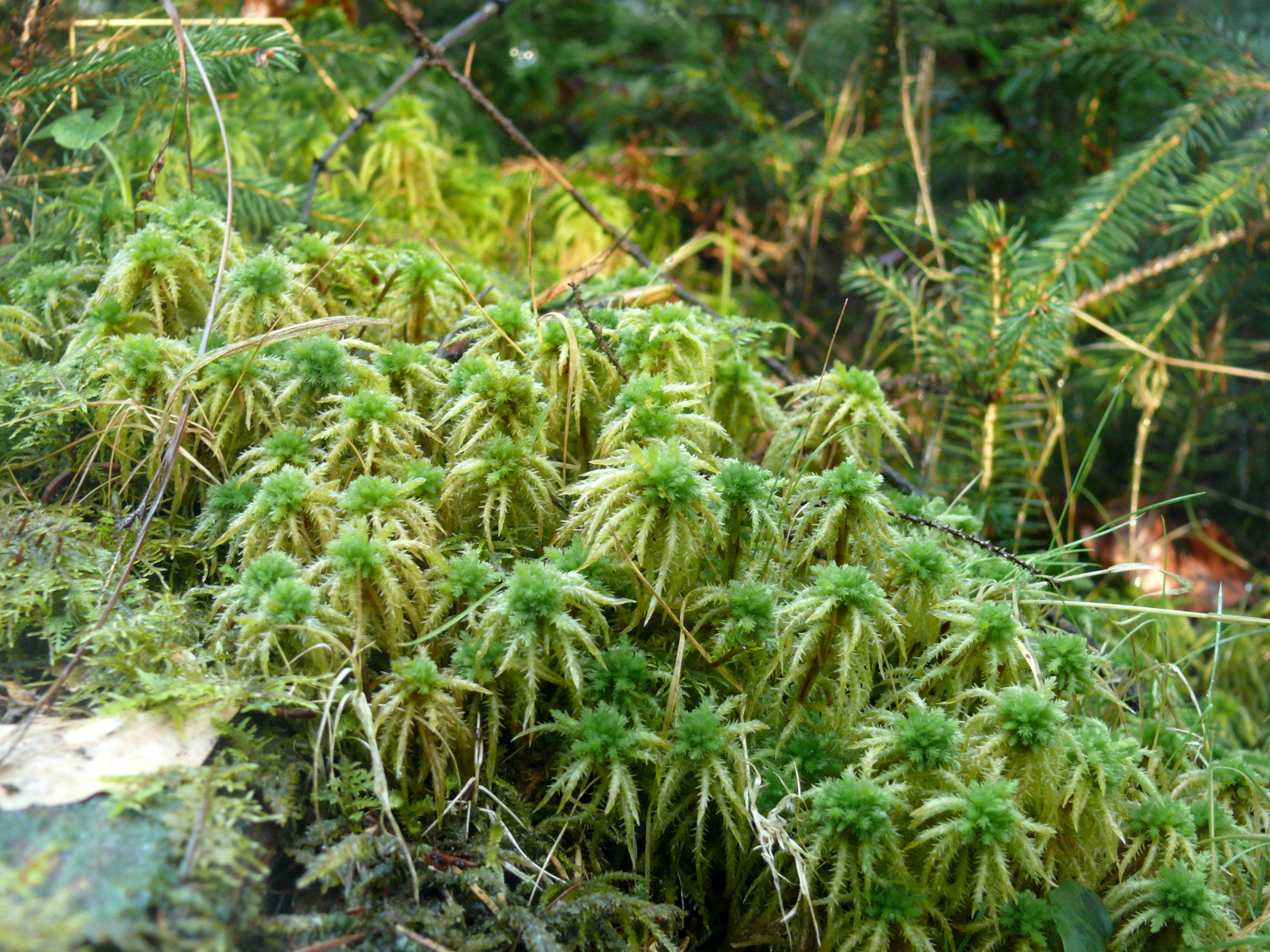 Sphagnum squarrosum, Schwäbisch-Fränkische Waldberge, Dautschland